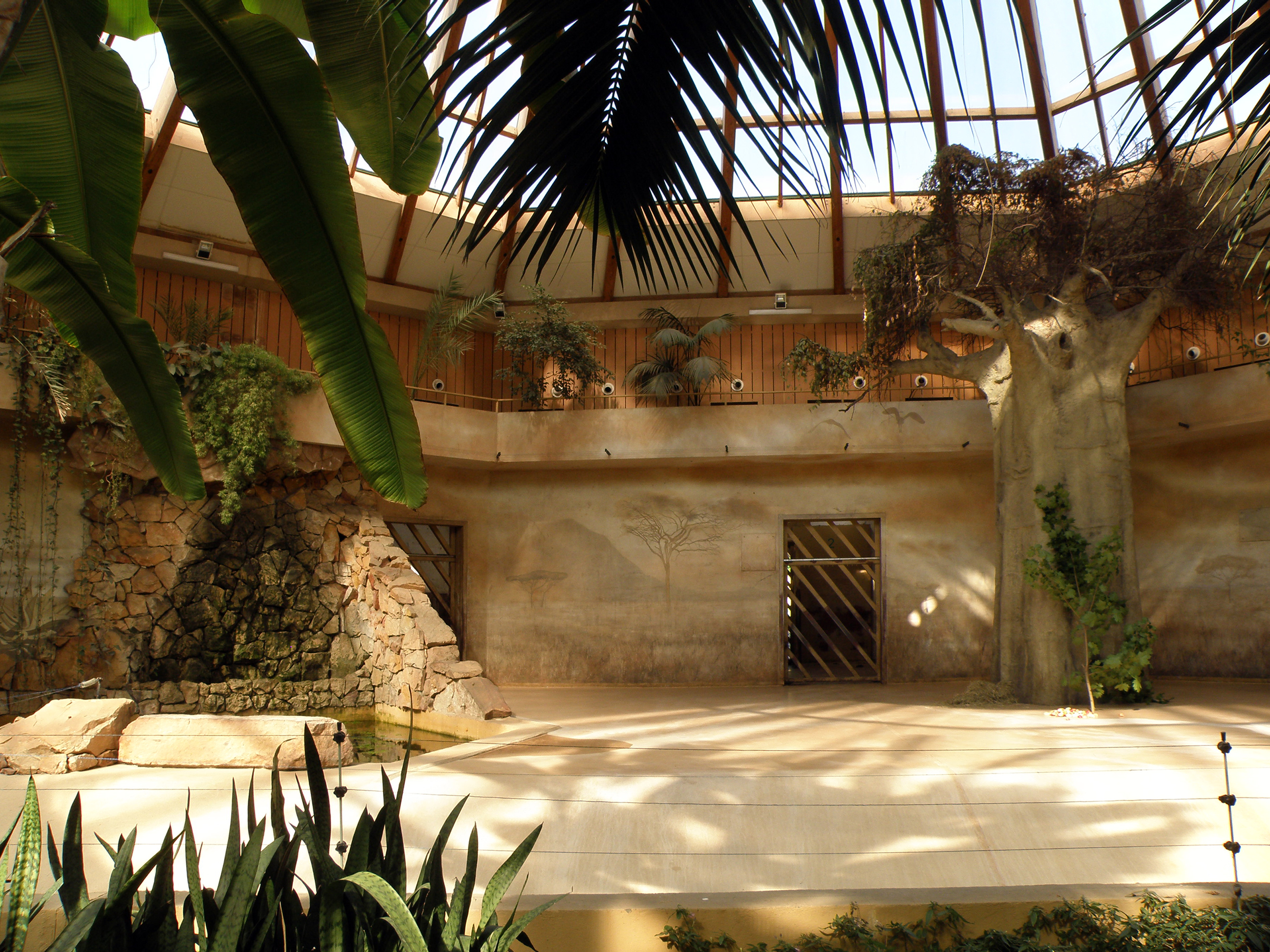 Warszawski Ogród Zoologiczny, Słoniarnia